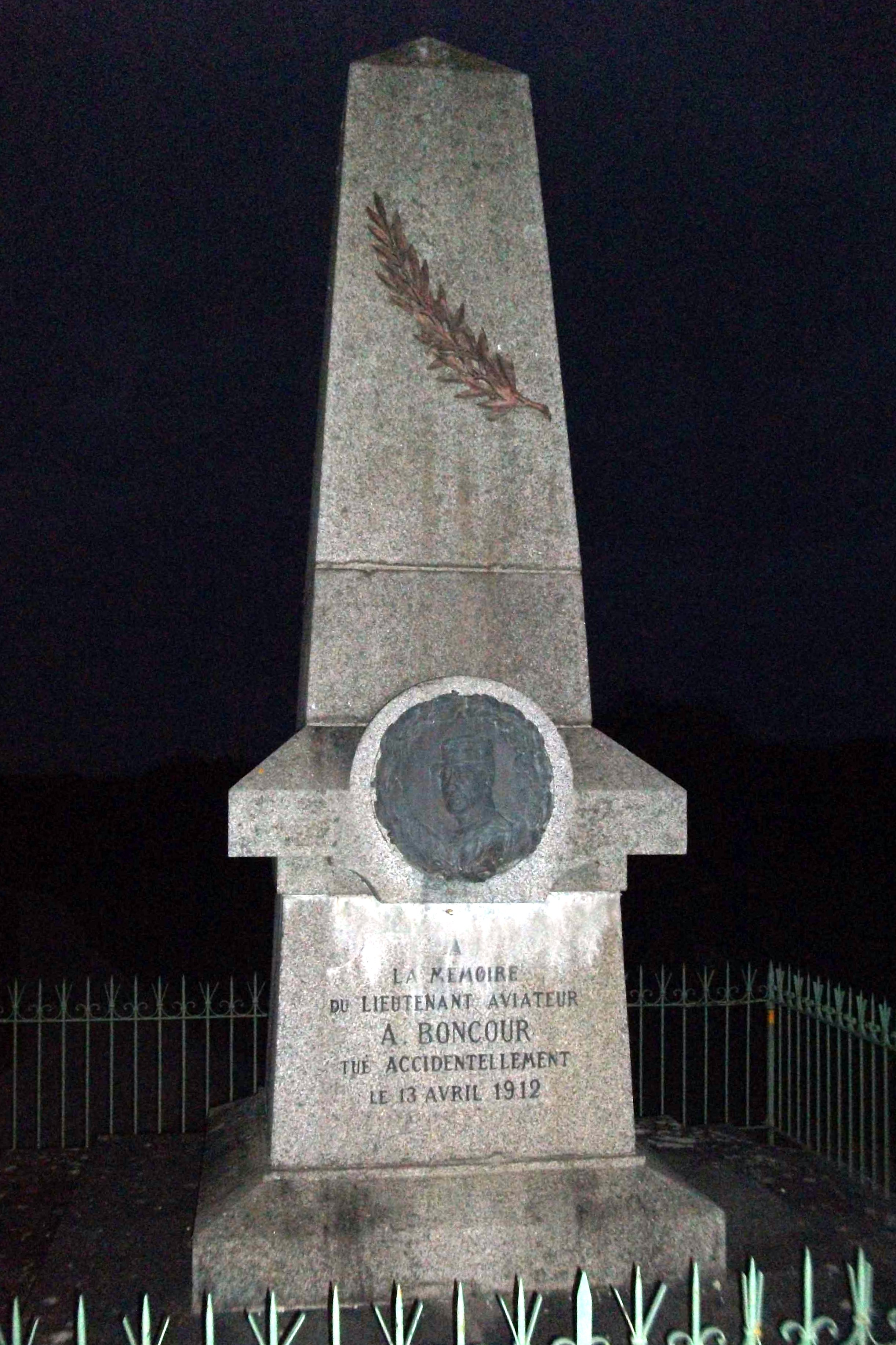 stèle se trouvant à Laimont en la mémoire du lieutenant aviateur A. Boncourt qui c'est tué là, le 13 avril 1912, en se rendant à une réunion d'aviation à Toul.